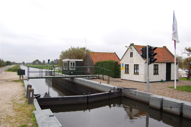 De Ziendesluis gelegen in de Ziendevaart tussen Zwammerdam en de Nieuwkoopseplassen.